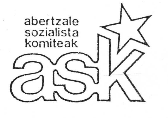 Logo de Abertzale Sozialista Komiteak (ASK)